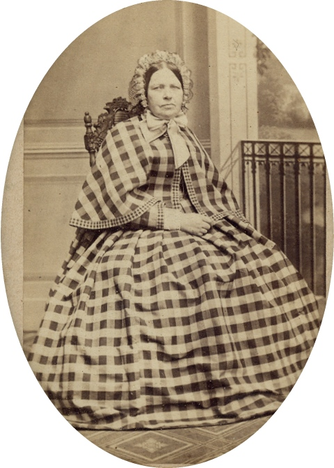 Ahnenbilder